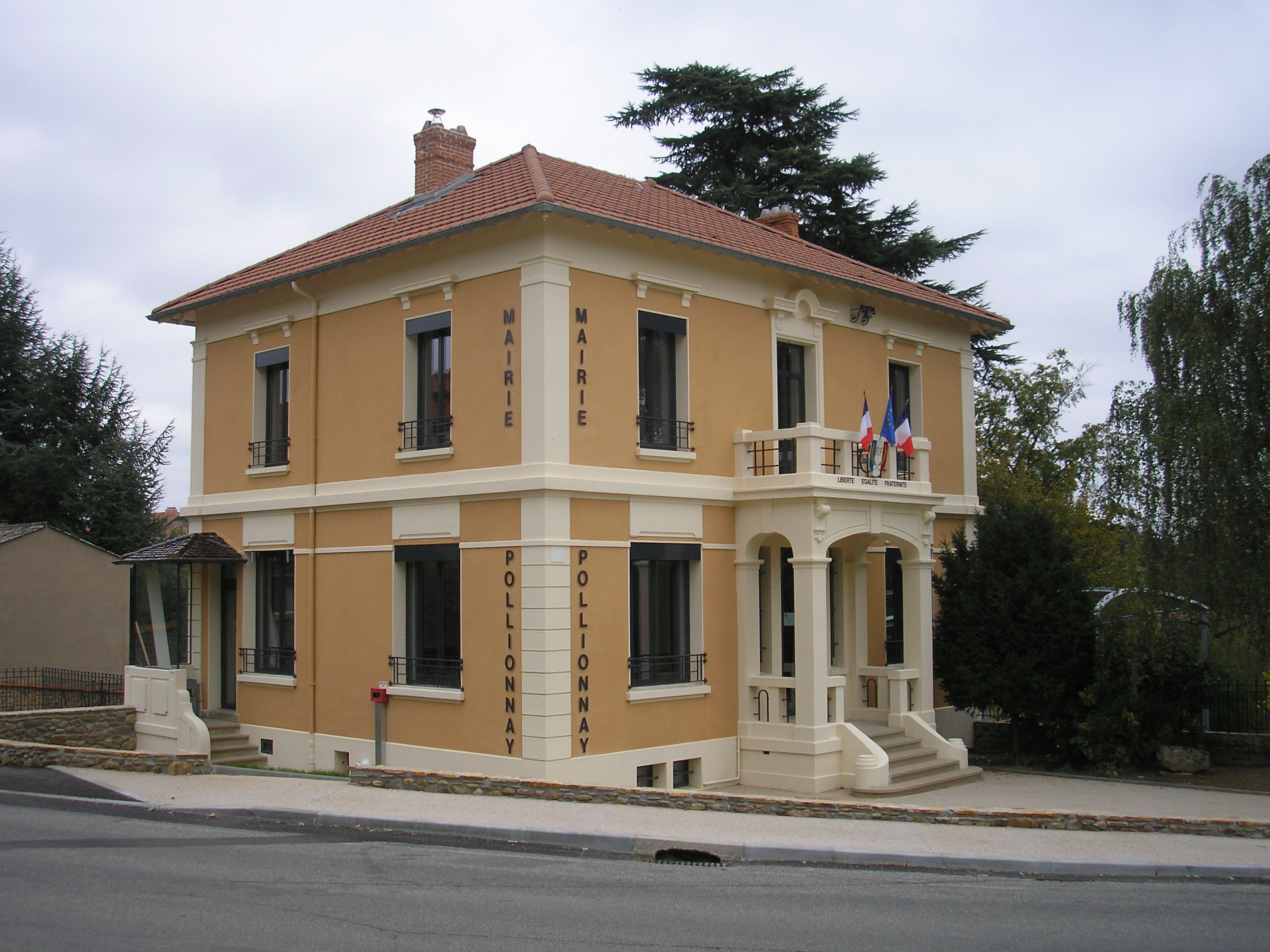 Mairie de Pollionnay en 2011